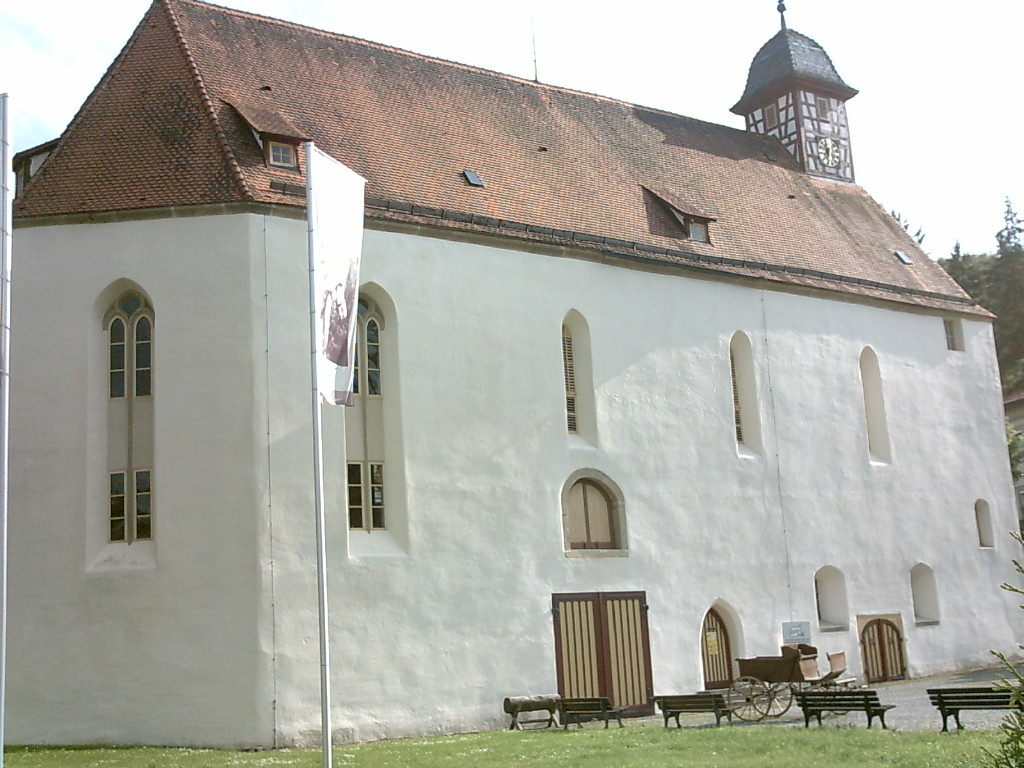 Kirche in Offenhausen, heute Gestütsmuseum